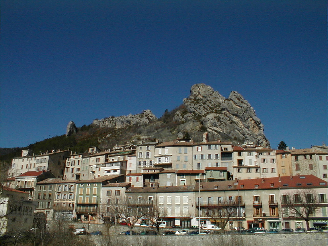 Village de Serres dans les Hautes-Alpes